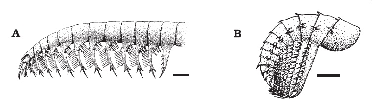 A. Spiculate first appendage of the anomalocaridid Anomalocaris briggsi, Early Cambrian, Australia (redrawn from Nedin 1995). B. Pectinate first appendage of the anomalocaridid Laggania cambria, Middle Cambrian, Canada (redrawn from Dzik and Lendzion 1988). Scale bars 10 mm